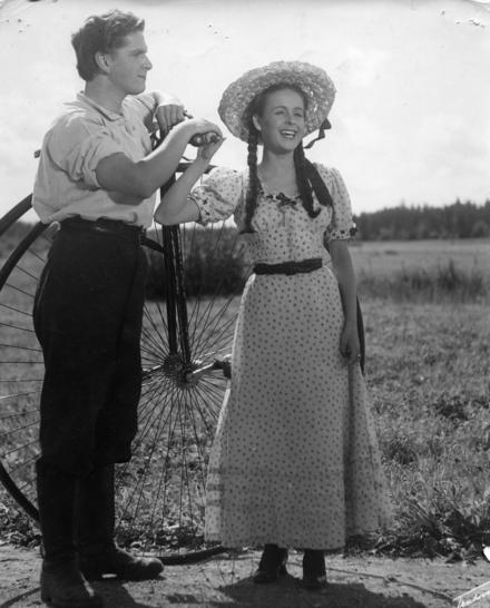 Näyttelijät Matti Ranin ja Eeva-Kaarinen Volanen elokuvassa Katupeilin takana (1949)